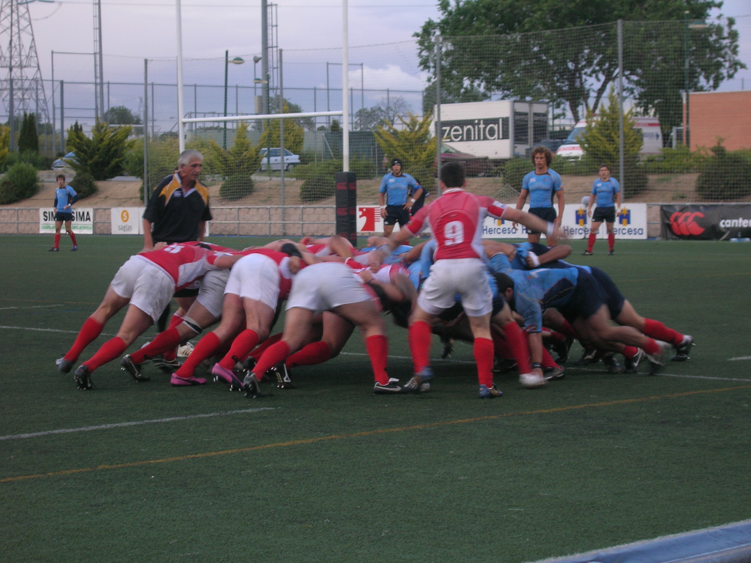 Melee durante el partido de la Liga Superibérica entre Gatos y Almogavers